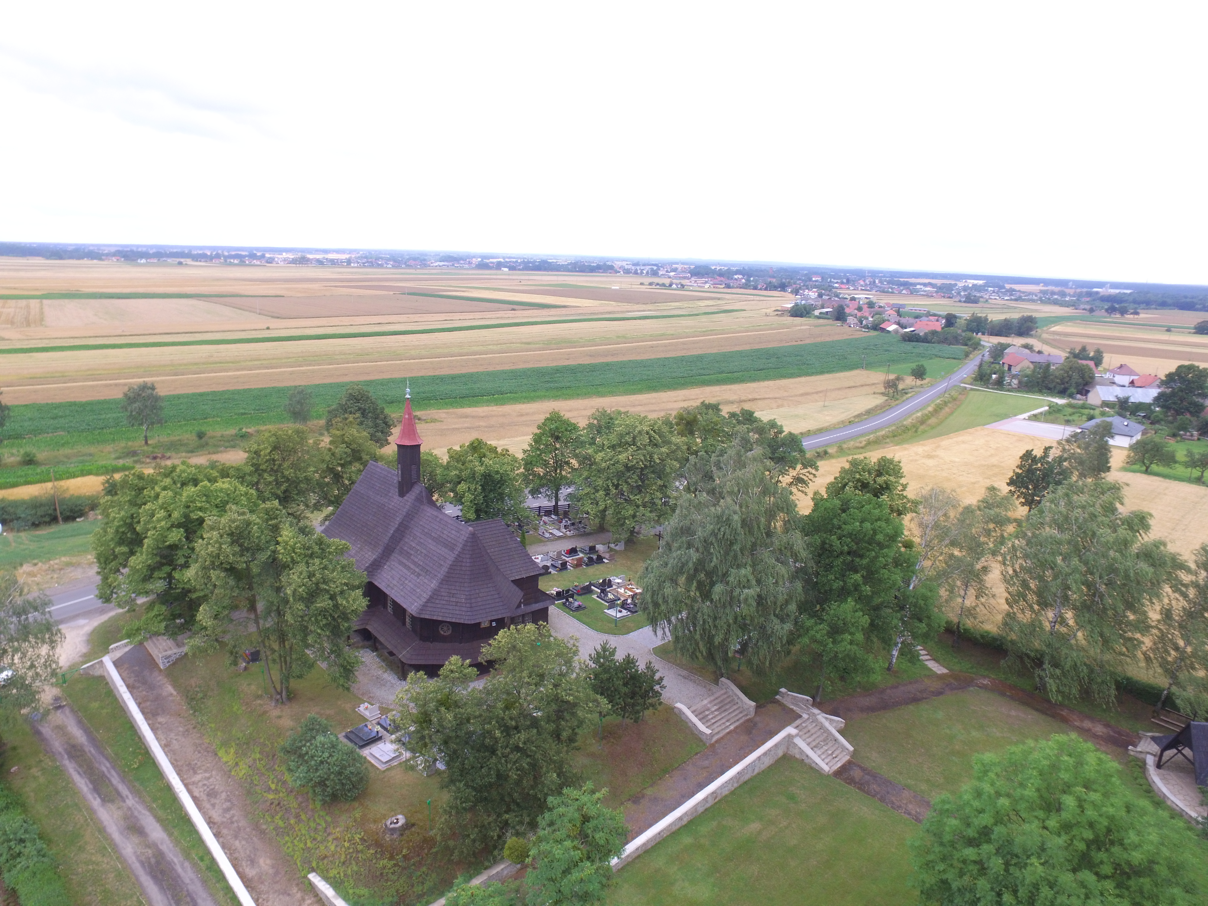 Kościół drewniany pw. św. Rocha w Grodzisku (pow. oleski).